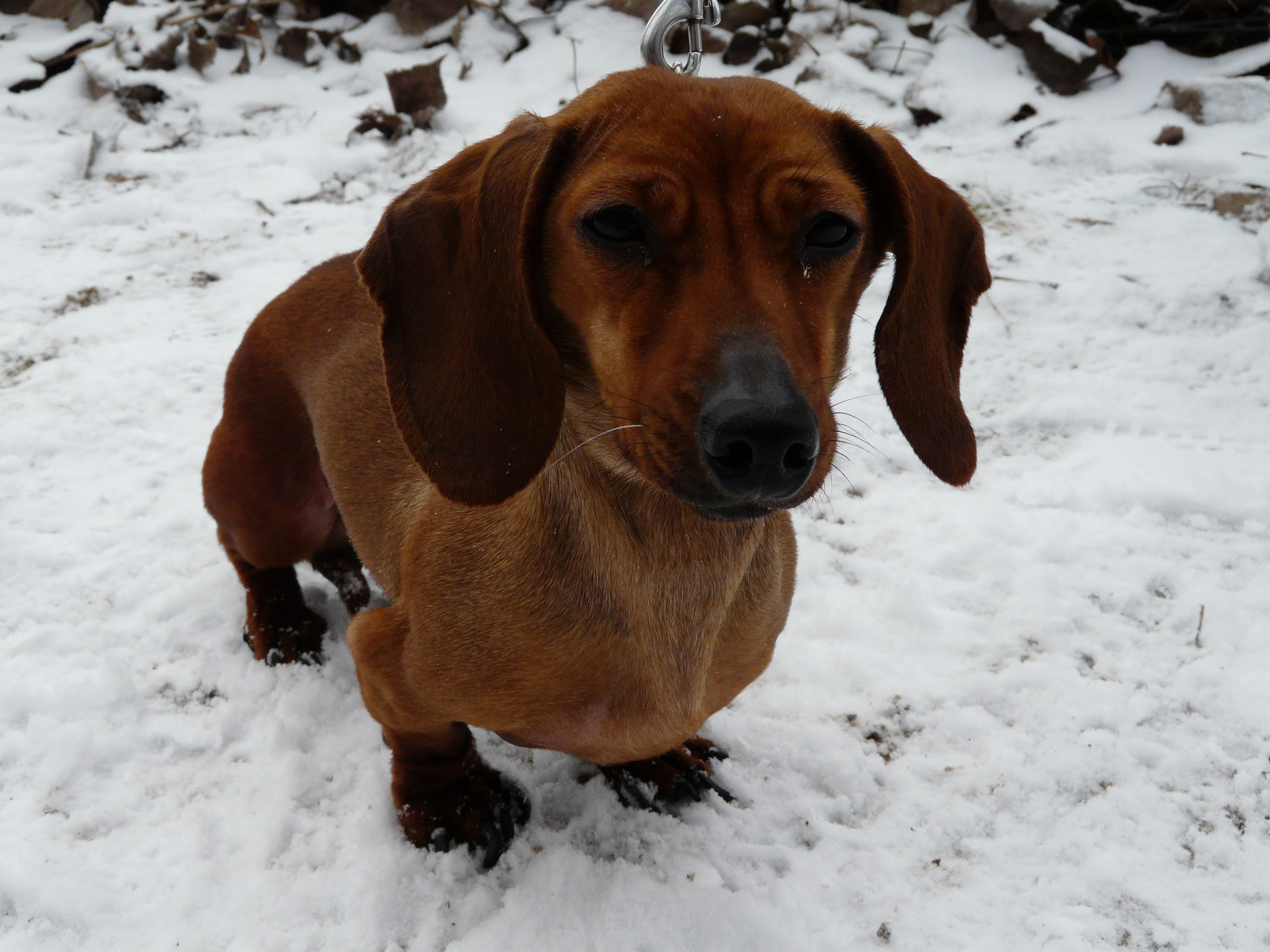 Jezevčík hladkosrstý červený s příměsí černé.